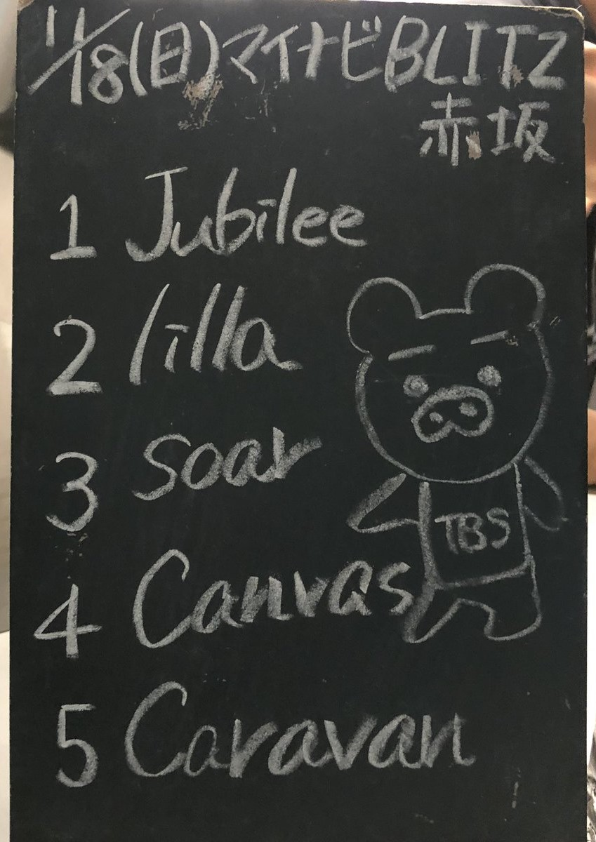 amiinAセトリボード(20181118(1))